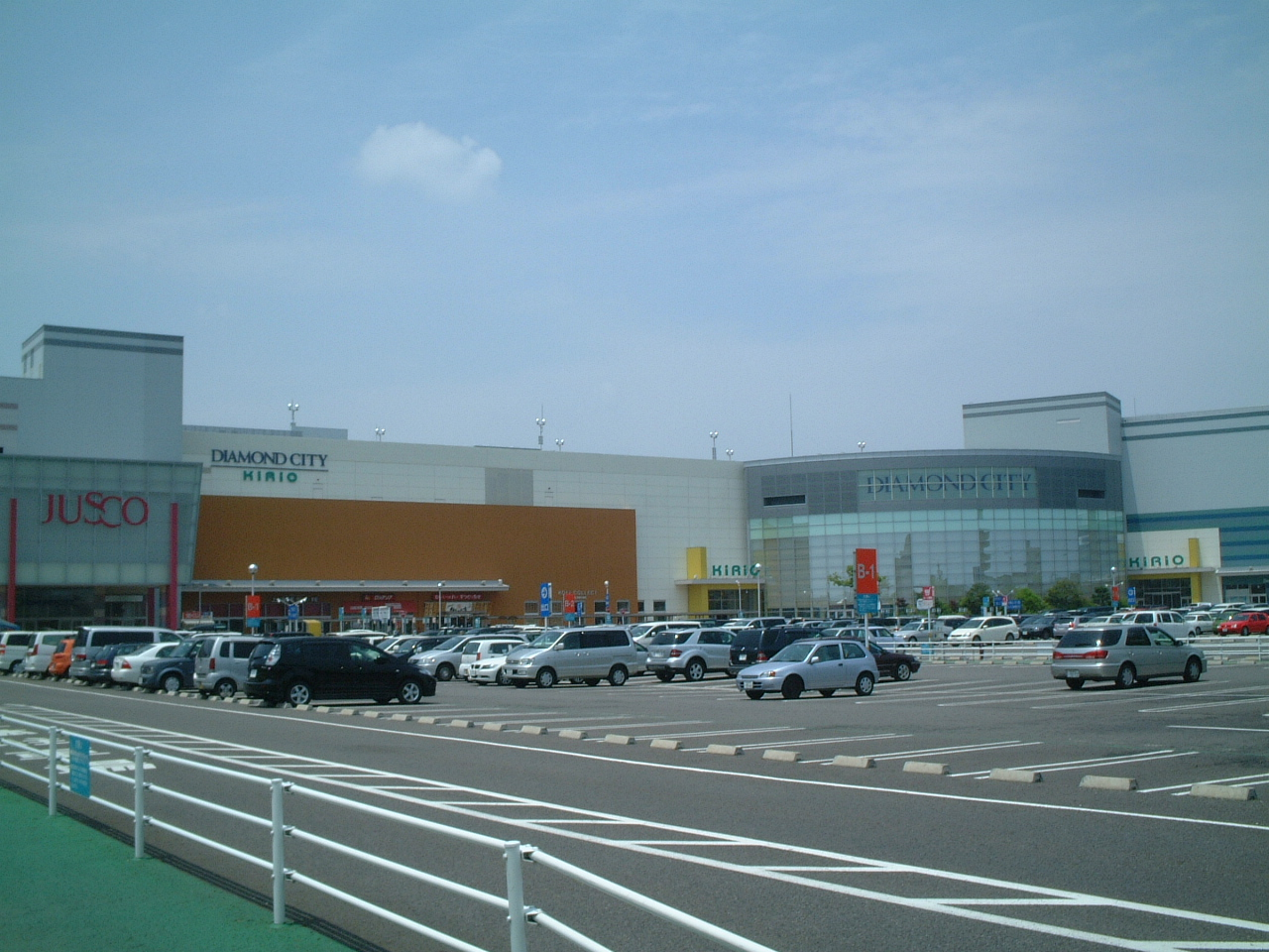 ダイヤモンドシティキリオの画像